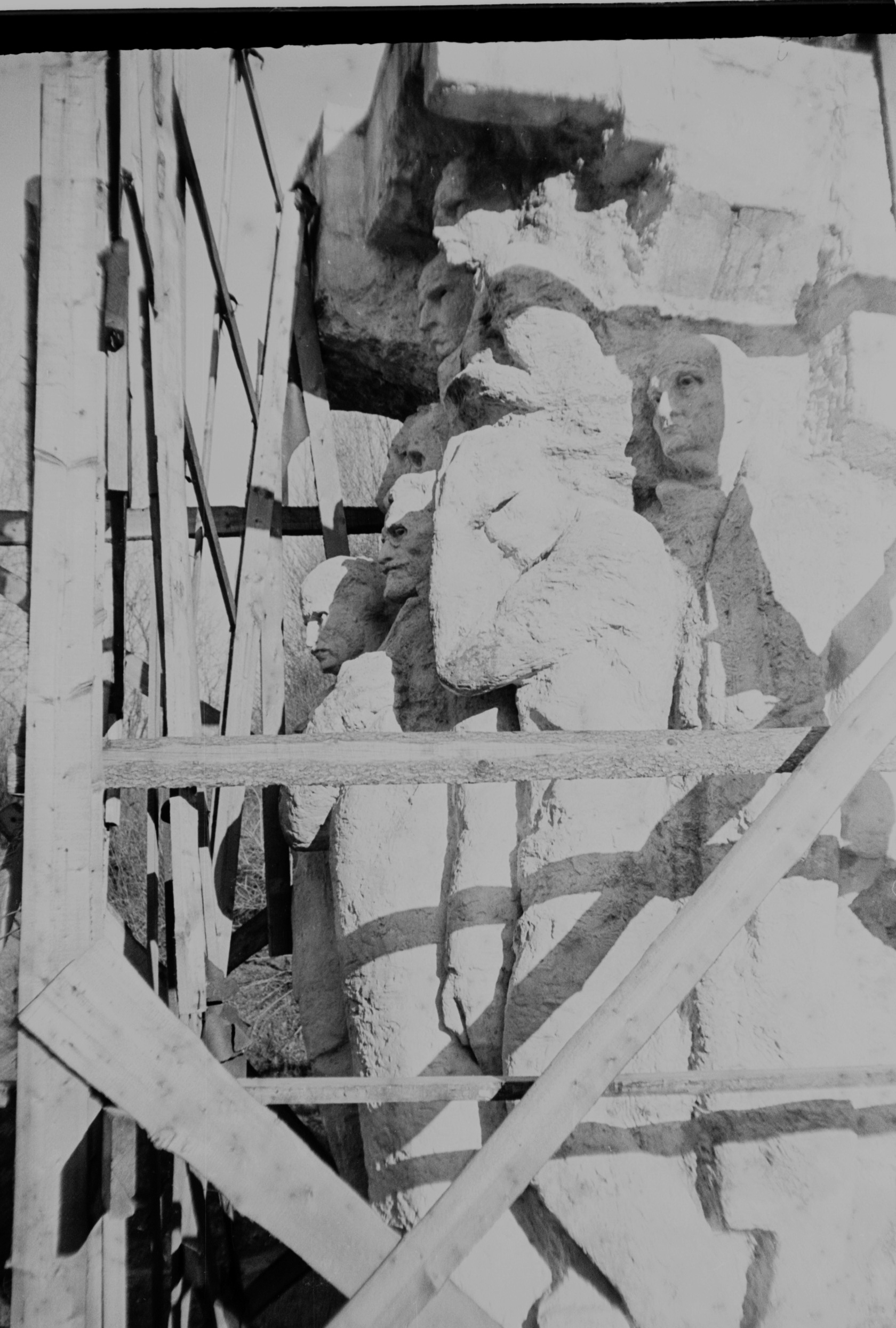 Pomnik pomordowanych profesorów polskich na Wzgórzach Wuleckich we Lwowie. Jedyny z trzech betonowych bloków, nigdy niedokończony i zdemontowany na początku lat 80tych XX w.